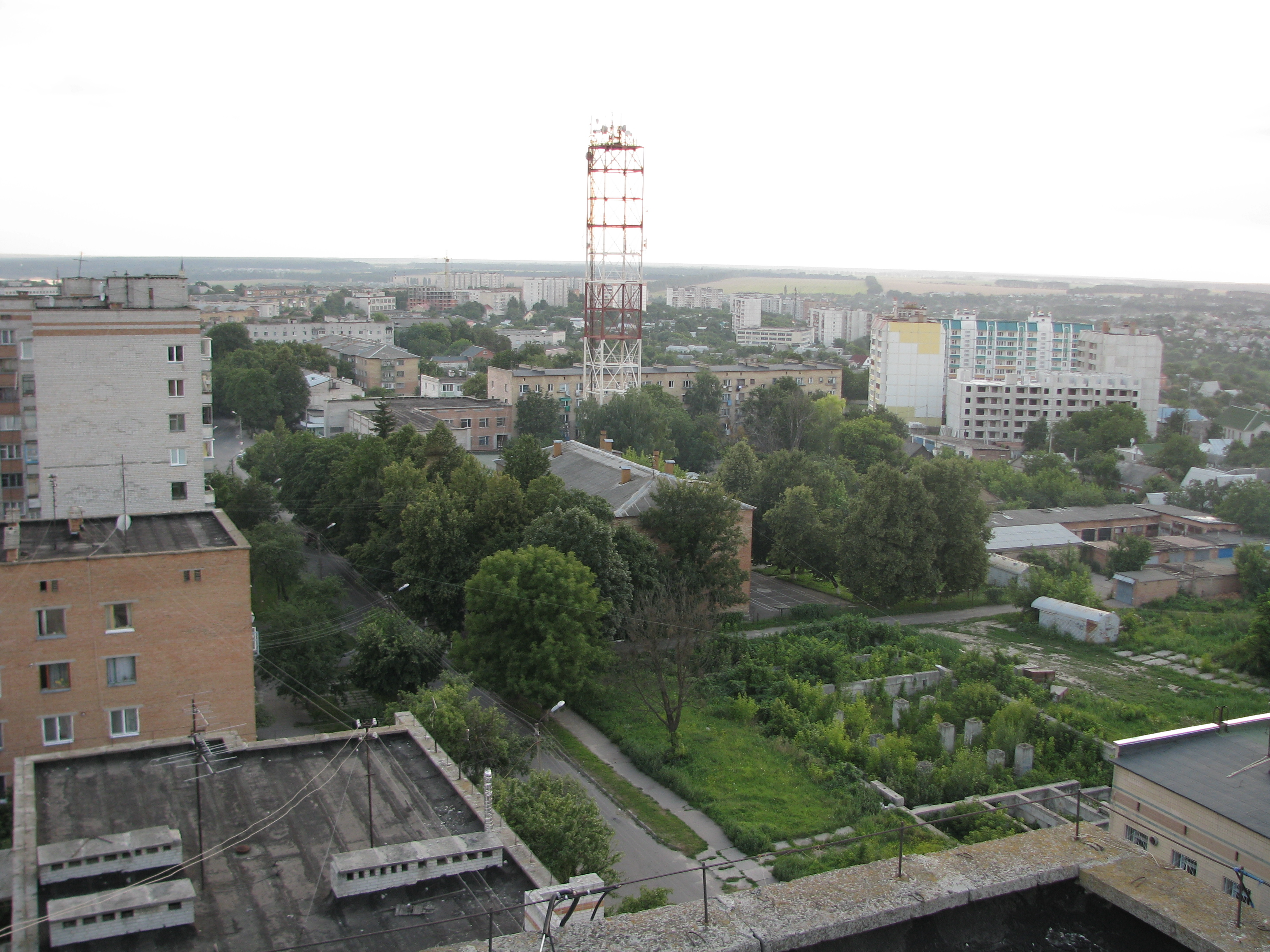 Fastivtown: Вигляд на місто з висоти 9 поверхового будинку